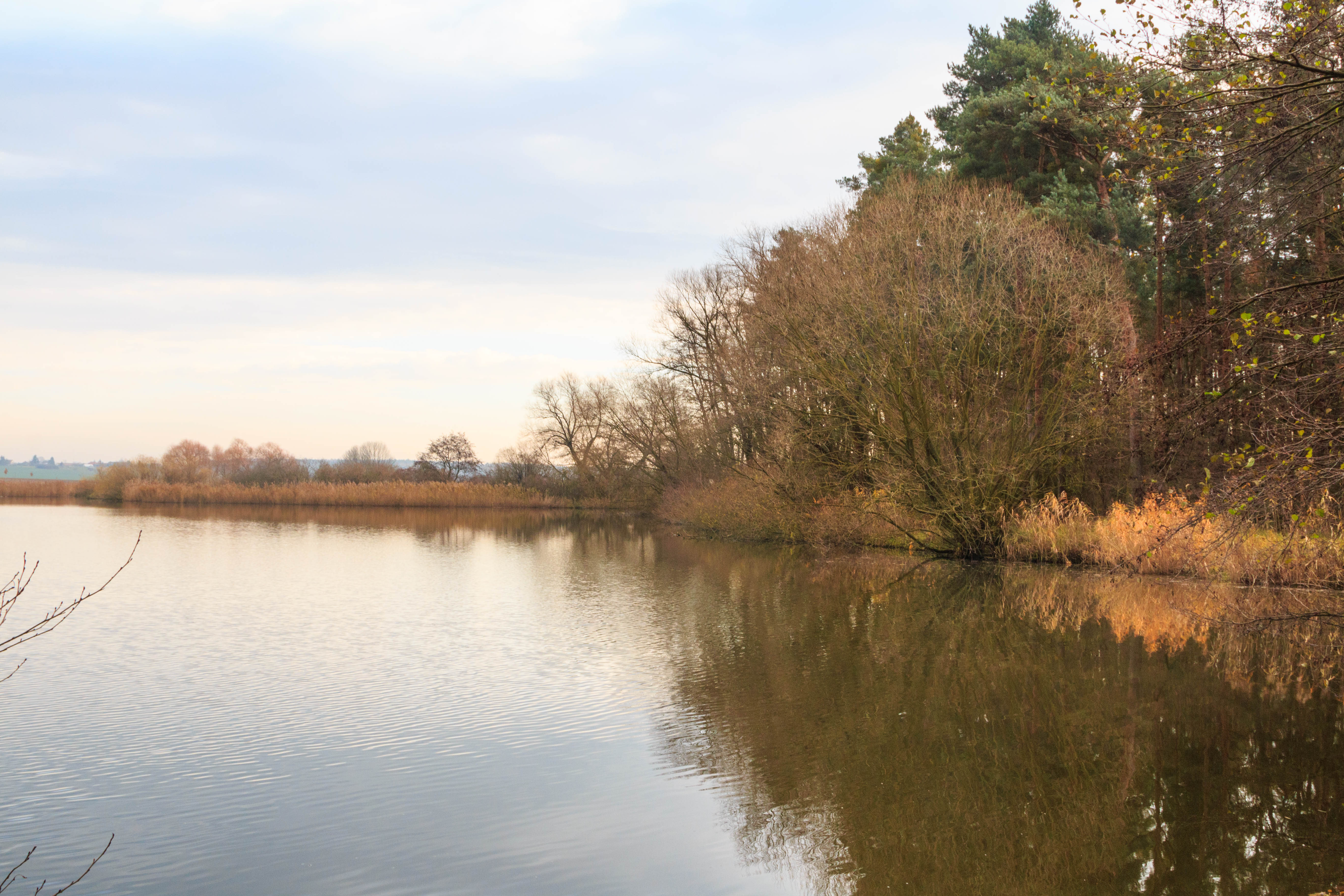 Babidolský rybník Project: Vodstvo.